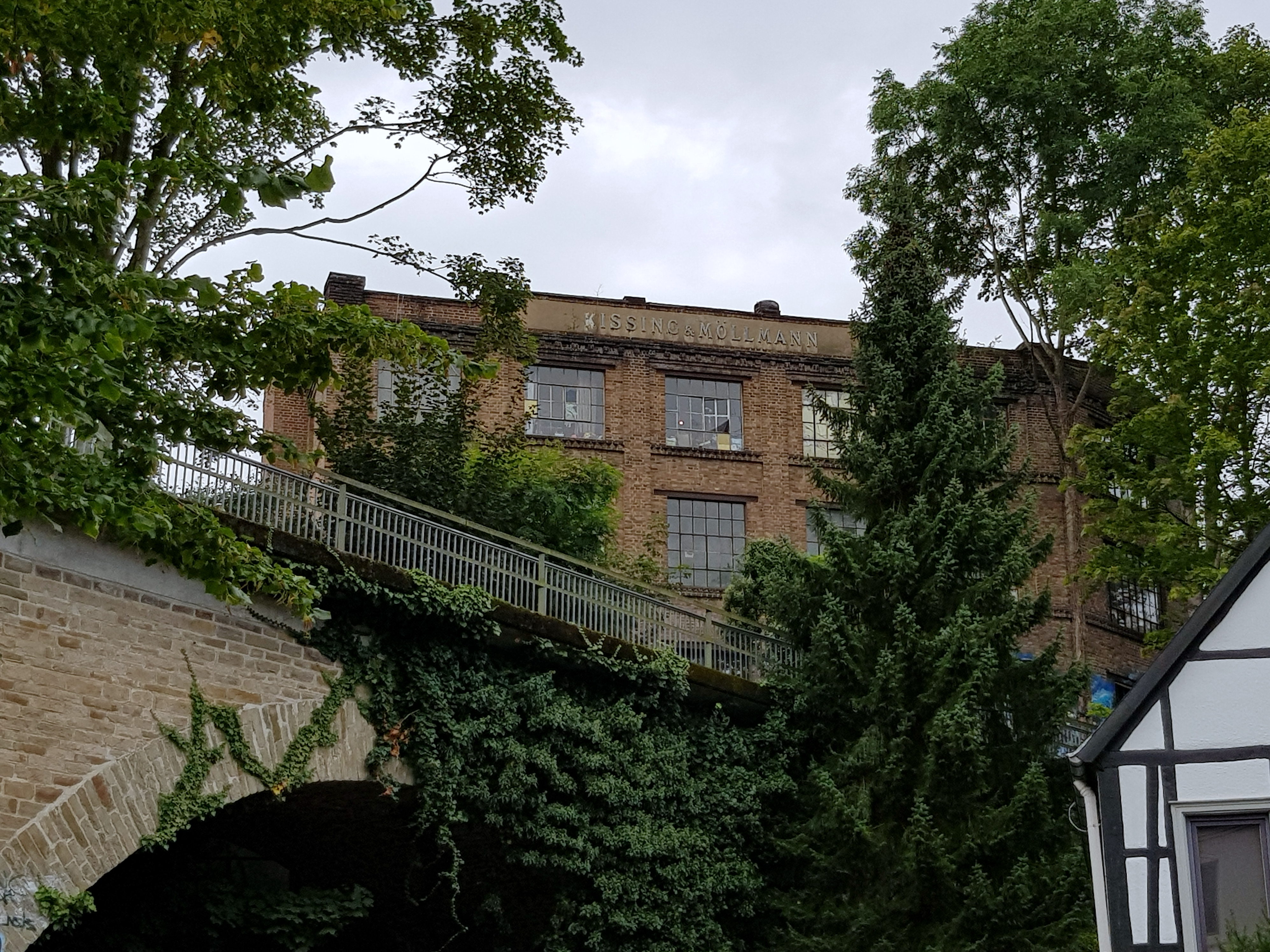 Denkmalgeschütztes Industriegebäude des ehemaliges Unternehmens Kissing & Möllmann in Iserlohn, Obere Mühle 28, am Tag des offenen Denkmals 2019. This image shows a heritage building in Germany, located in the North Rhine-Westphalian city Iserlohn (no. 106).